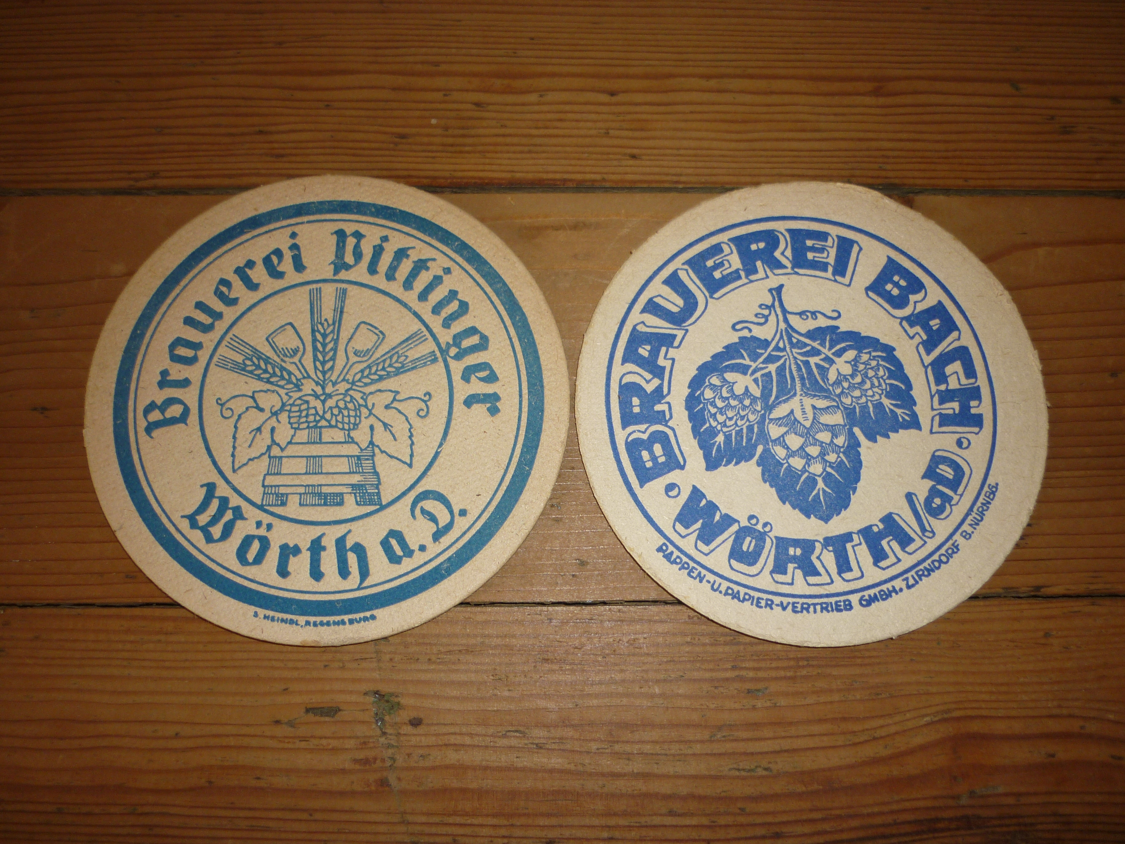 Bierfilz Brauerei Pittinger und Zierer Wörth Donau